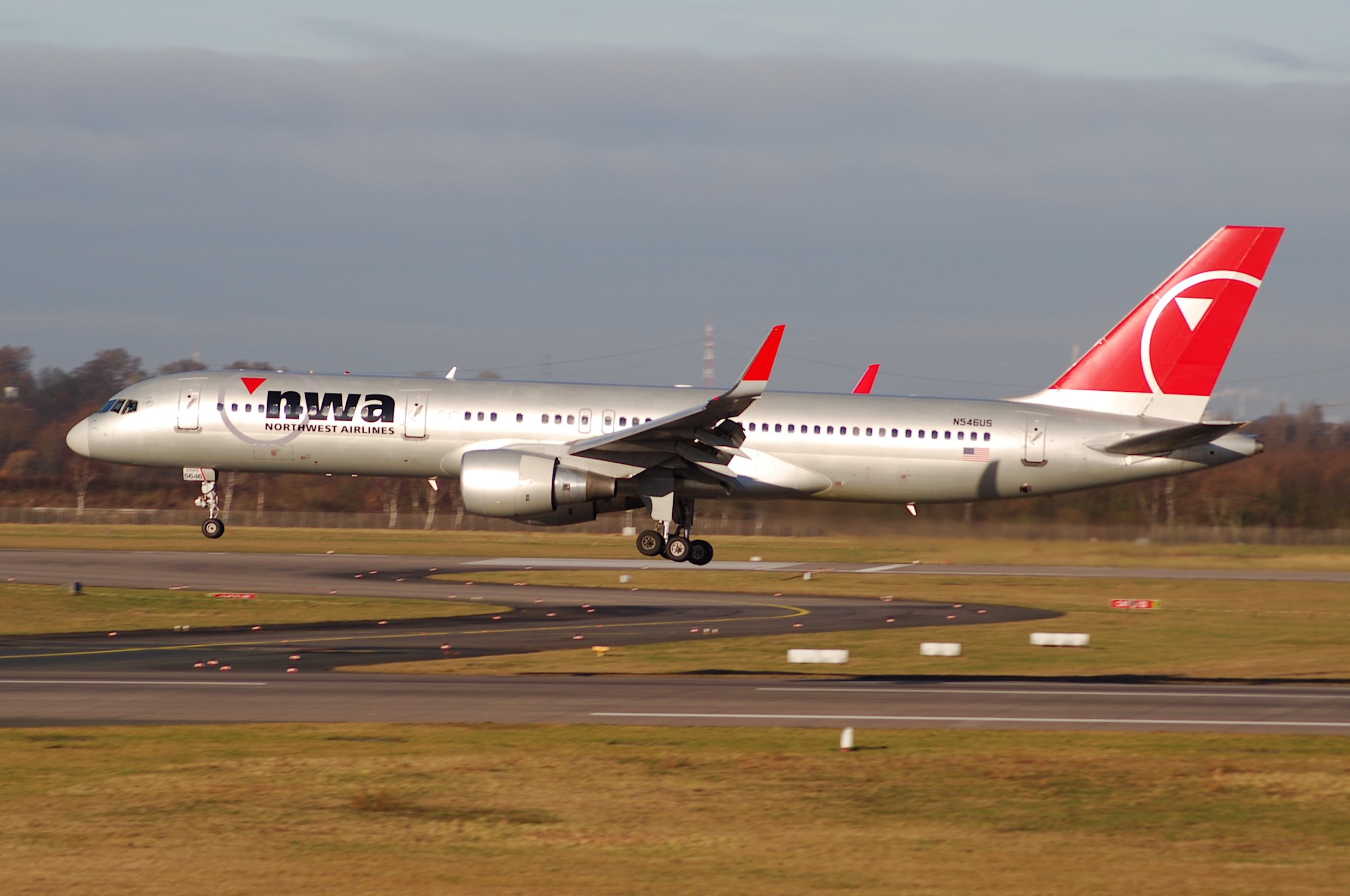 Northwest Airlines Boeing 757-251; N546US@DUS;13.01.2008/492fo